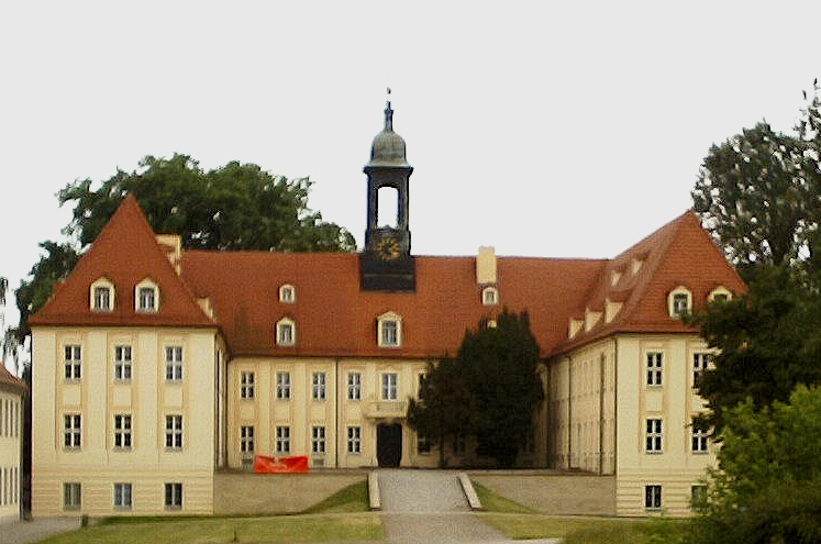 Elsterschloss Ostseite